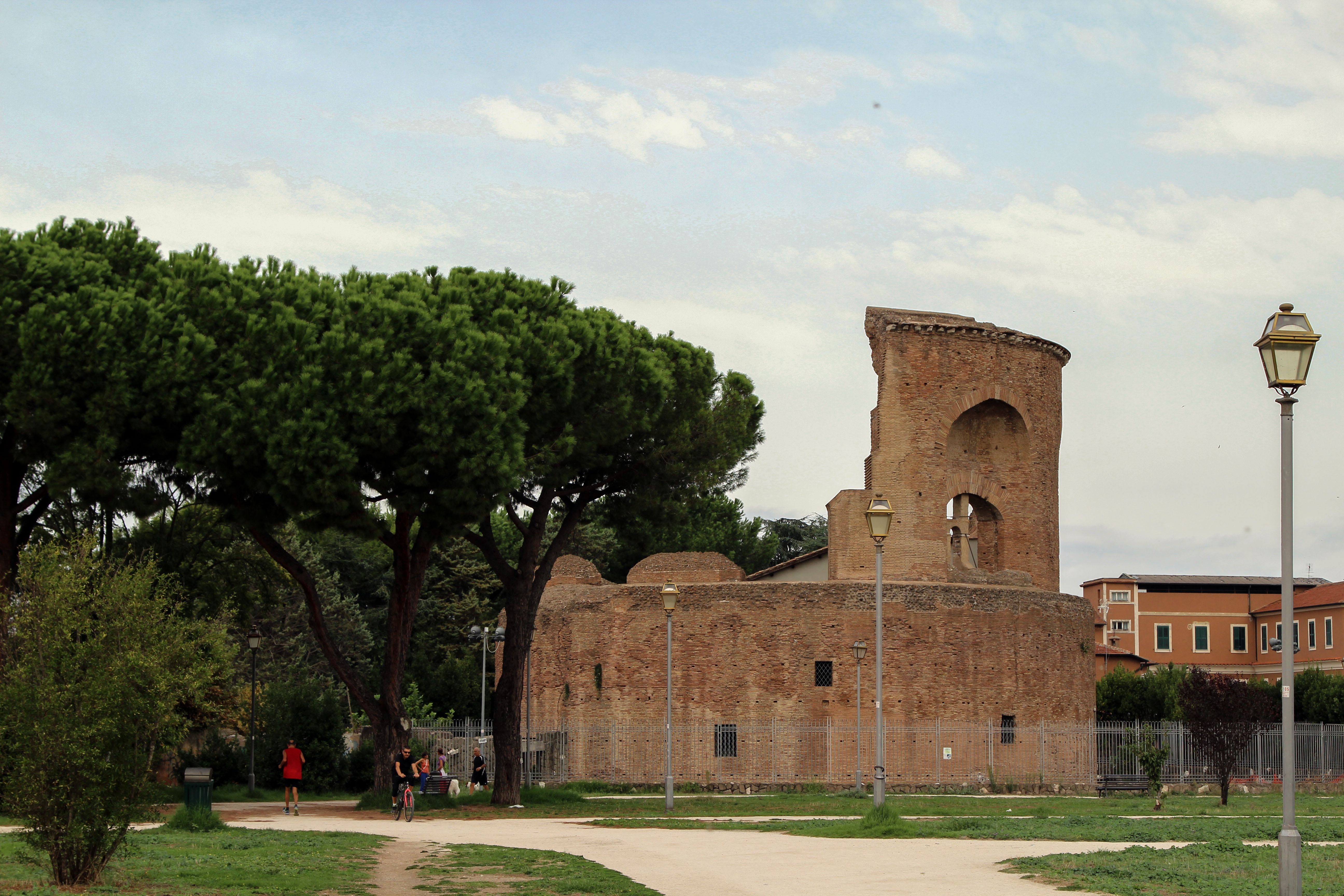 Mausoleo di Sant'Elena - Ville De Sanctis This is a photo of a monument which is part of cultural heritage of Italy.